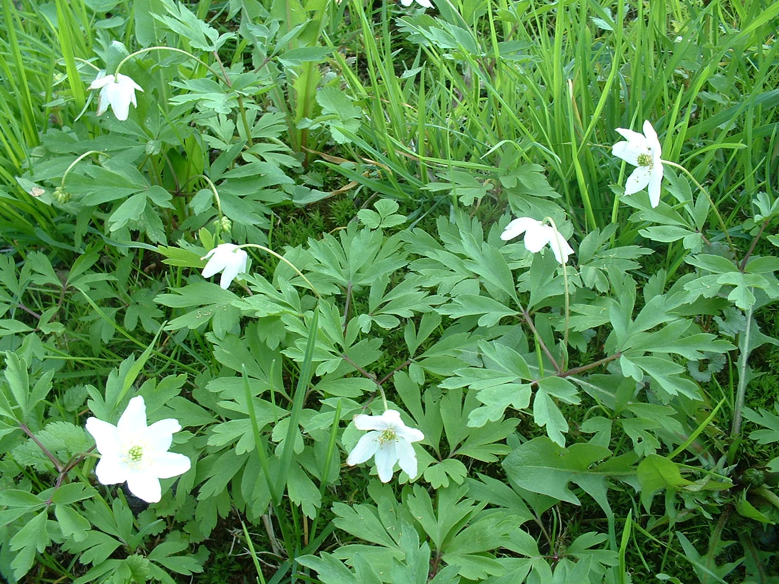 Anemone nemorosa Source: Metju12 - 04/2005 - FujiFinePix 2600Z